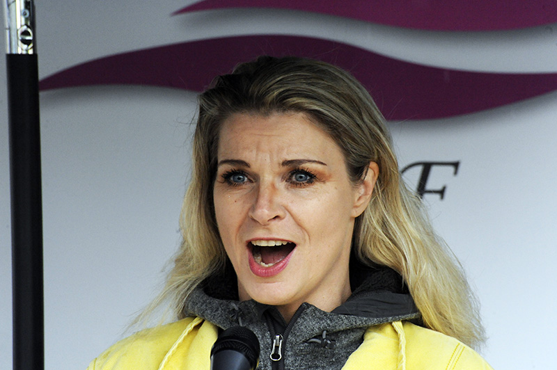 Charlotta Huldt-Ramberg